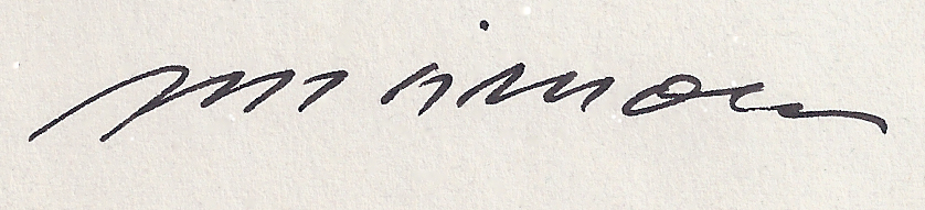 Signatur seines handschriftlichen Briefes an mich vom 21.12.1994